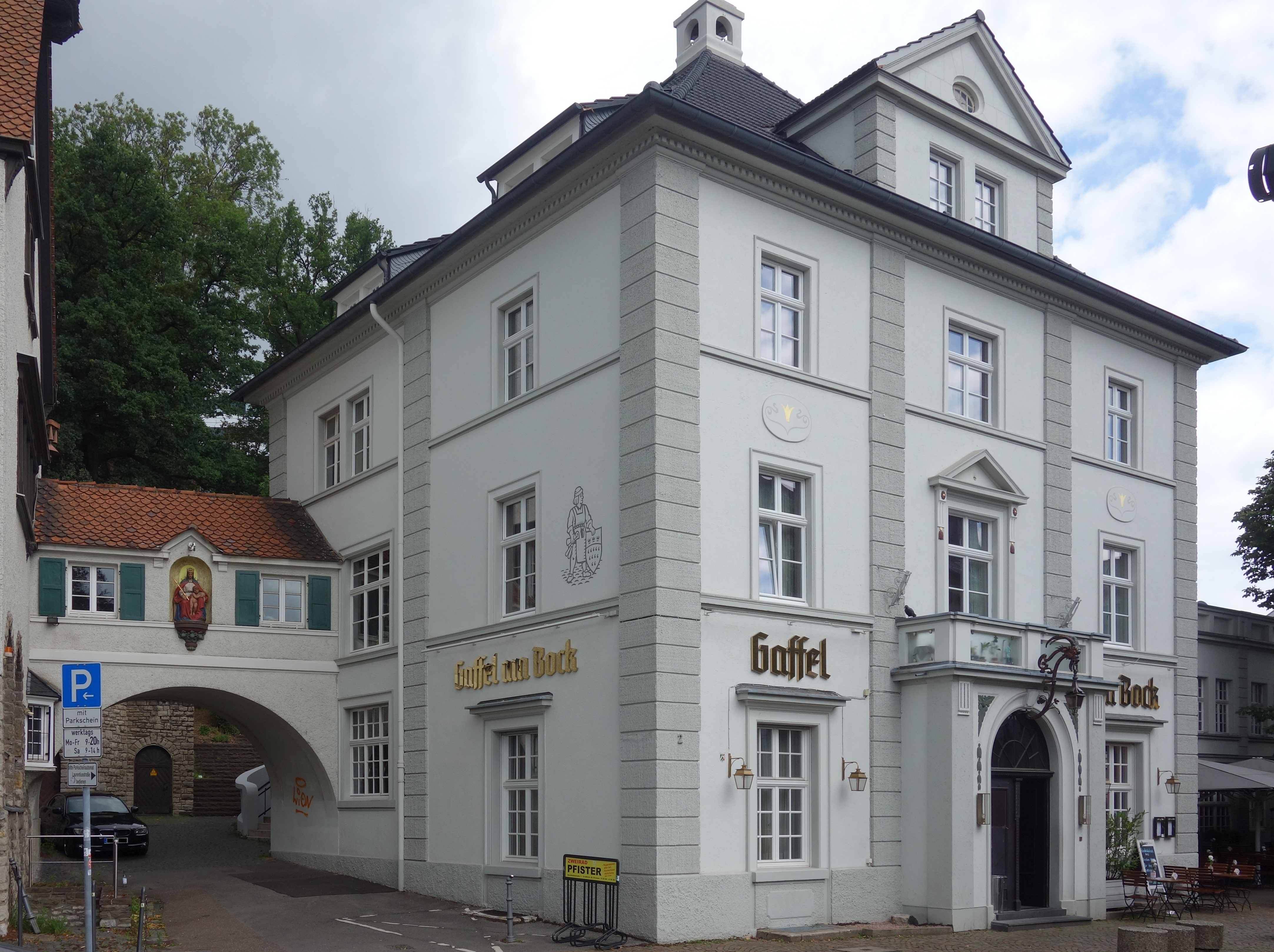 Wirtshaus am Bock in Bergisch Gladbach am Markt